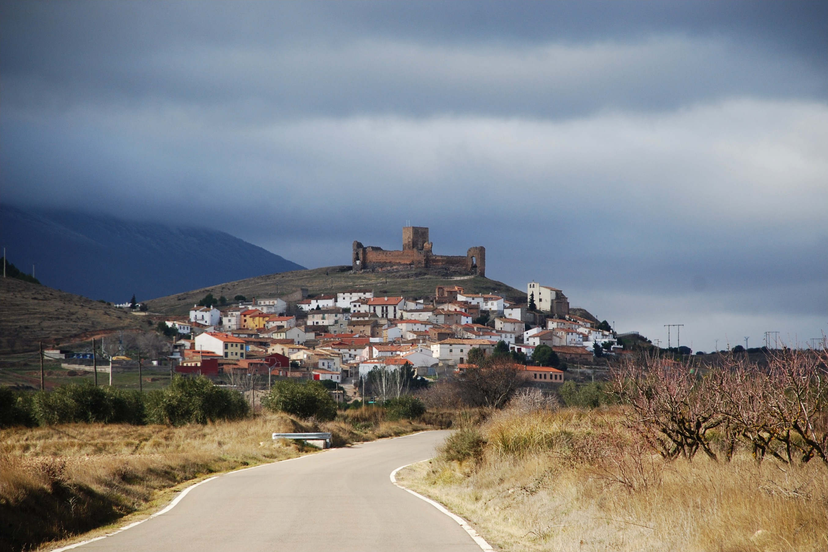 Trasmoz, provincia de Zaragoza (España)